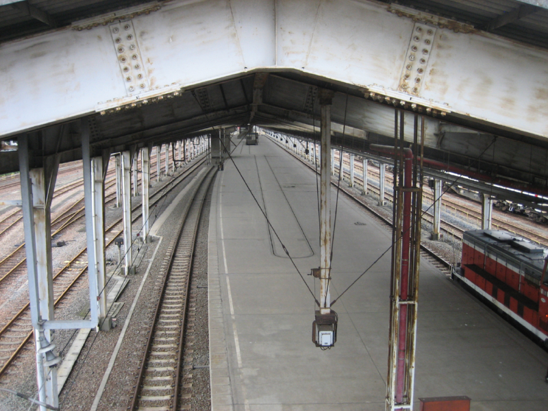 横浜羽沢駅にあるプラットホーム風の構造物